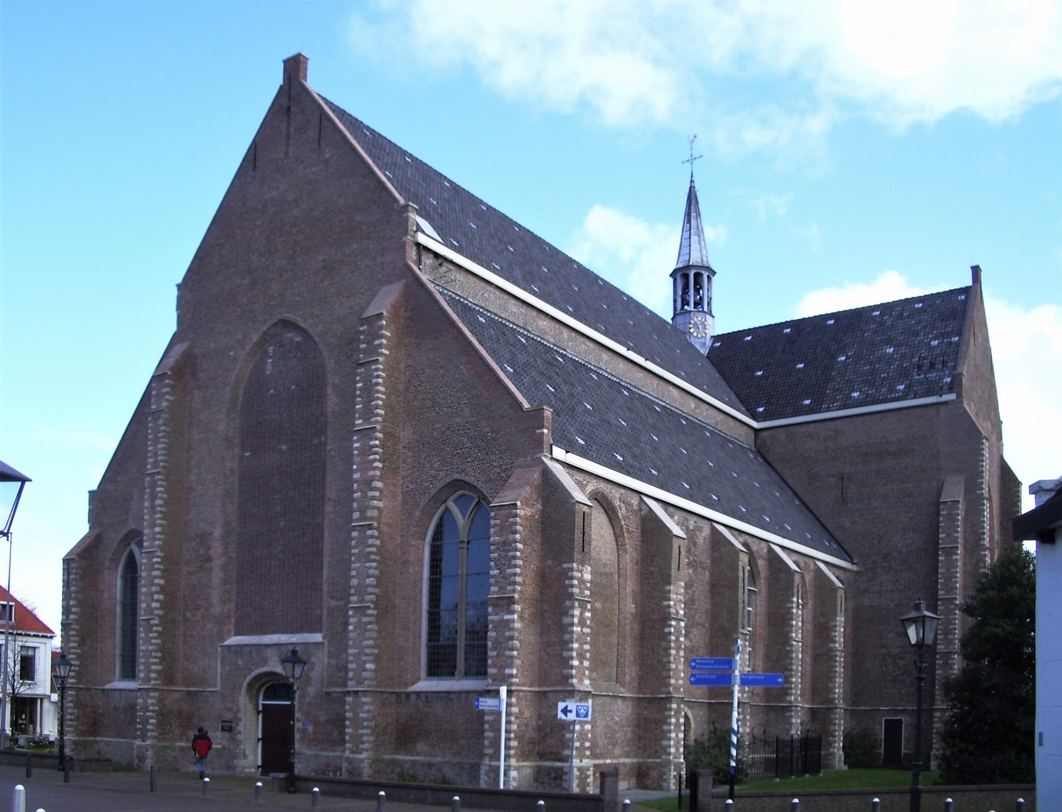 Burgh-Haamstede, Reformierte Kirche